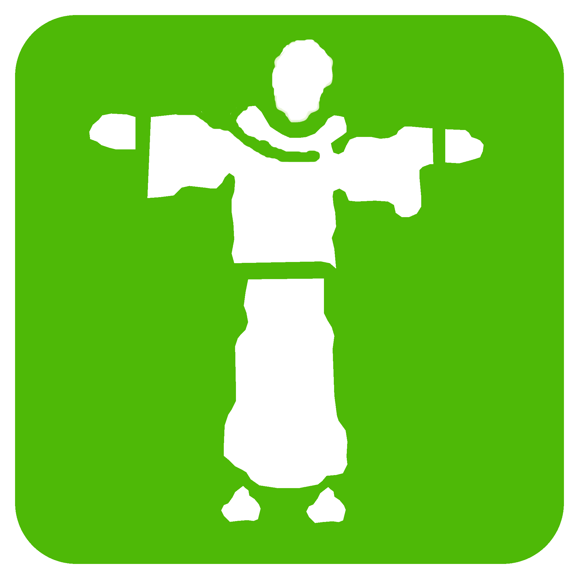 Símbolo utilizado para identificar a la estación San Francisco de Mostazal en 2001.